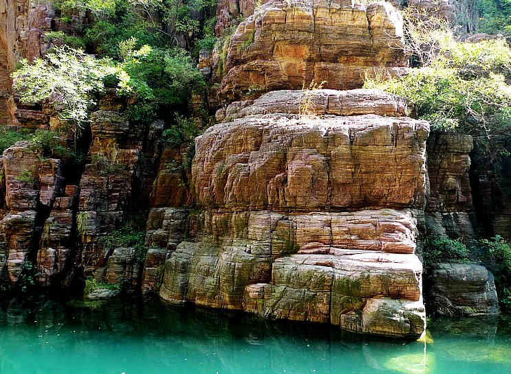 Yuntai mountain